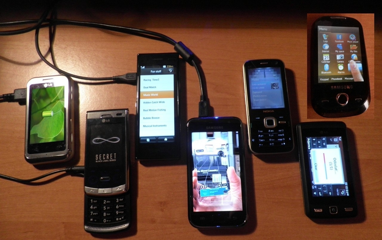 maketa se skutečným displejem